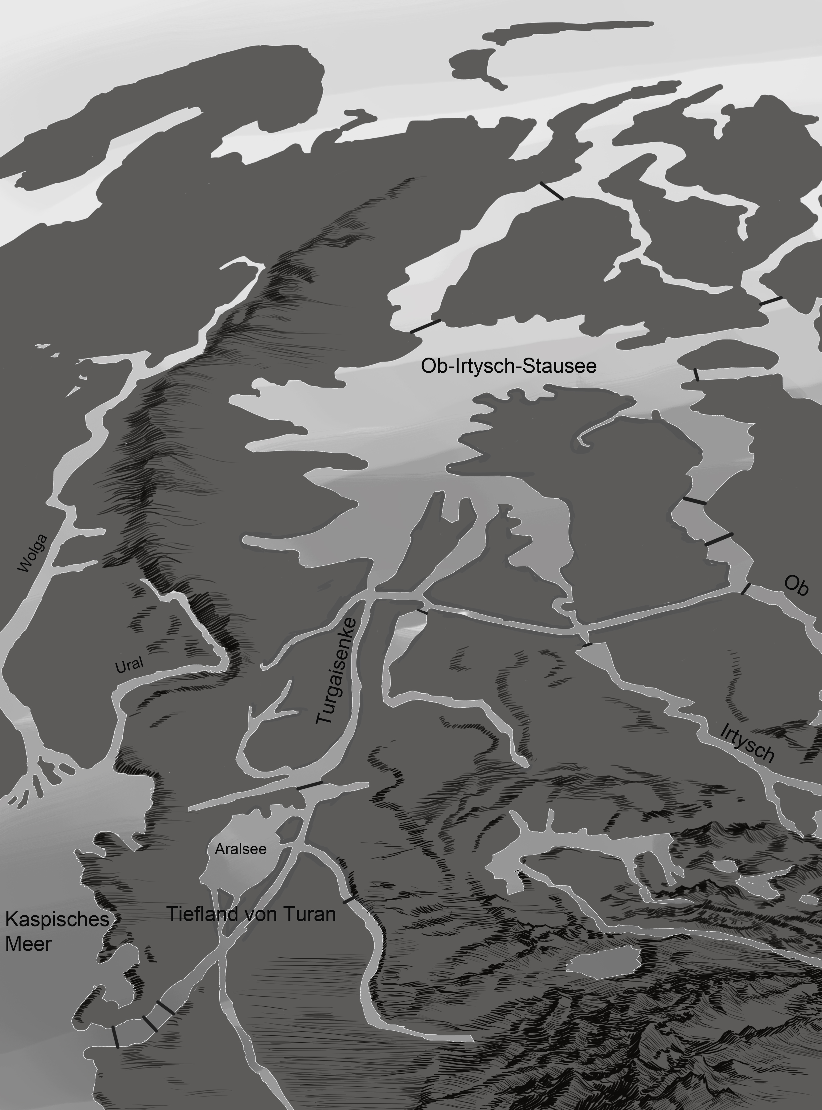 Zeichnerische Darstellung des Dawydow-Plans auf Grundlage einer Illustration in "Rund um die Erde" (Der Kinderbuchverlag Berlin - DDR 1970 Lizenz-Nr. 304-270/346/79-(113))